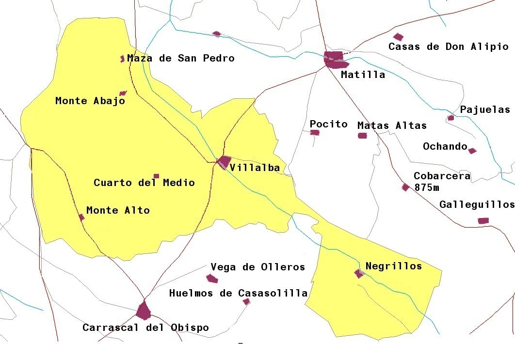 Villalba de los Llanos. Negrillos. Maza de San Pedro. Monte Abajo. Campo Charro. Salamanca